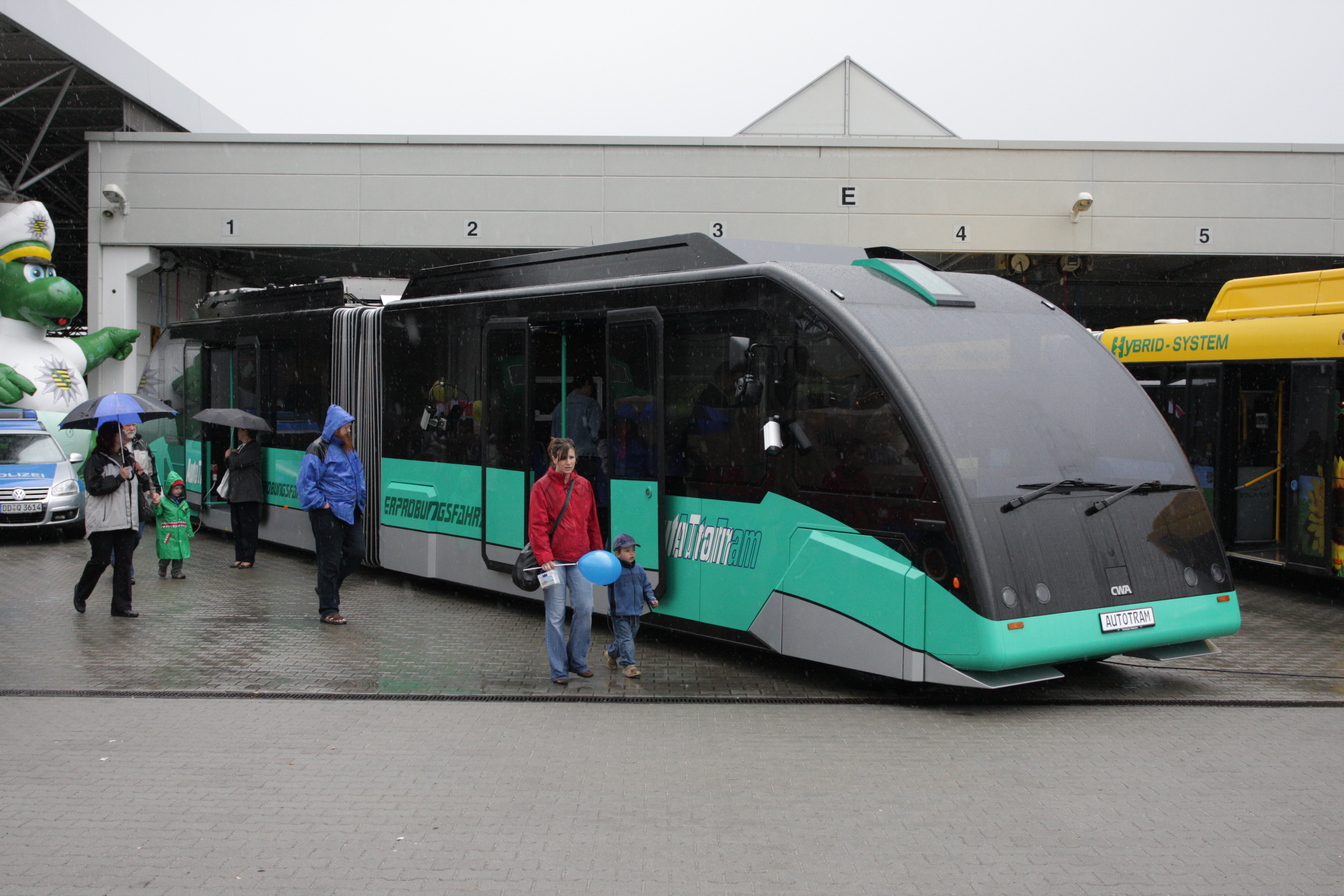 AutoTram Busbahn mit optischem Leitsystem im Busbetriebshof Dresden Gruna (95 Jahre Busbetrieb in Dresden)